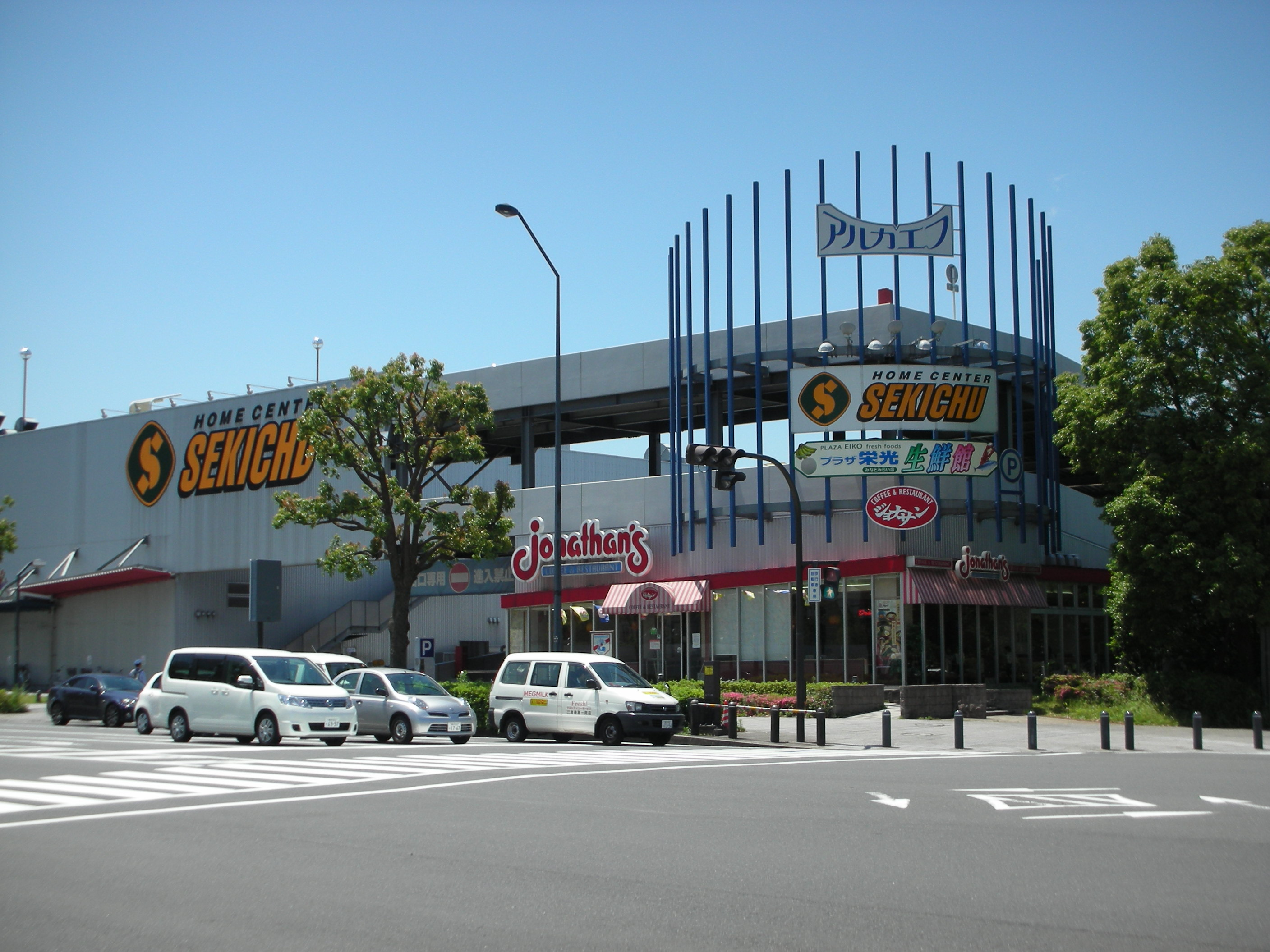 セキチュー横浜みなとみらい店の外観